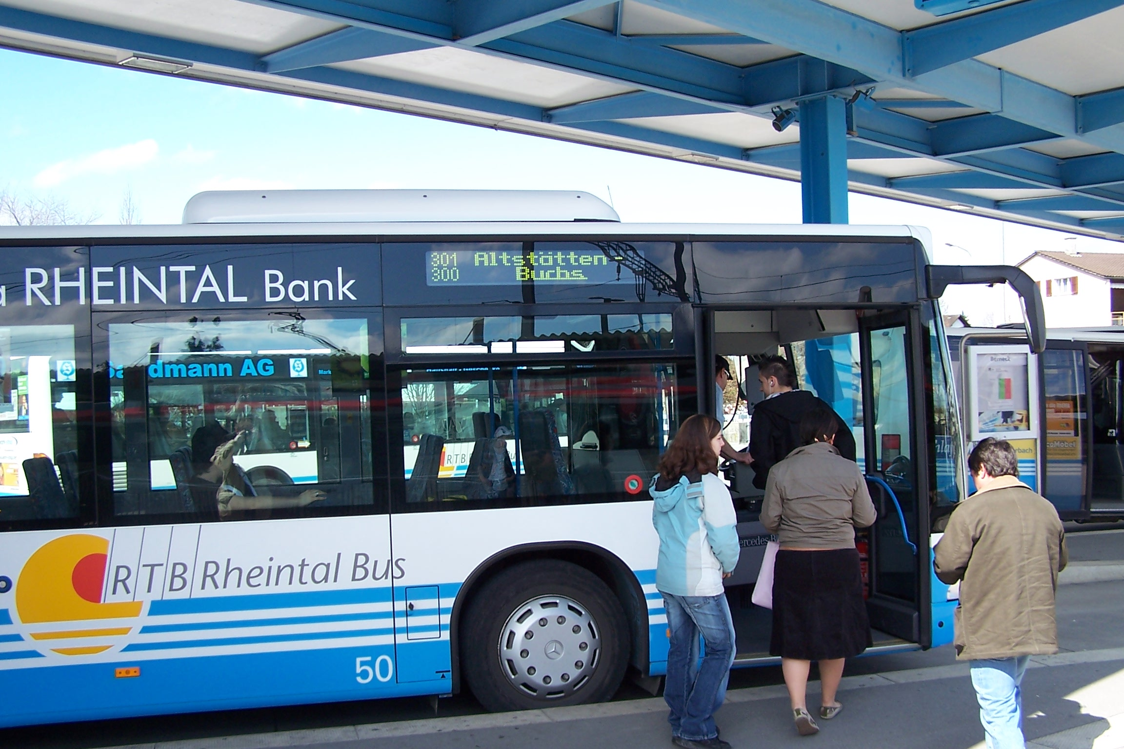 Ein Rheintal-Bus (betrieben von RTB Rheintal Bus AG) in Heerbrugg, Fahrt über Altstätten nach Buchs SG (Schweiz)